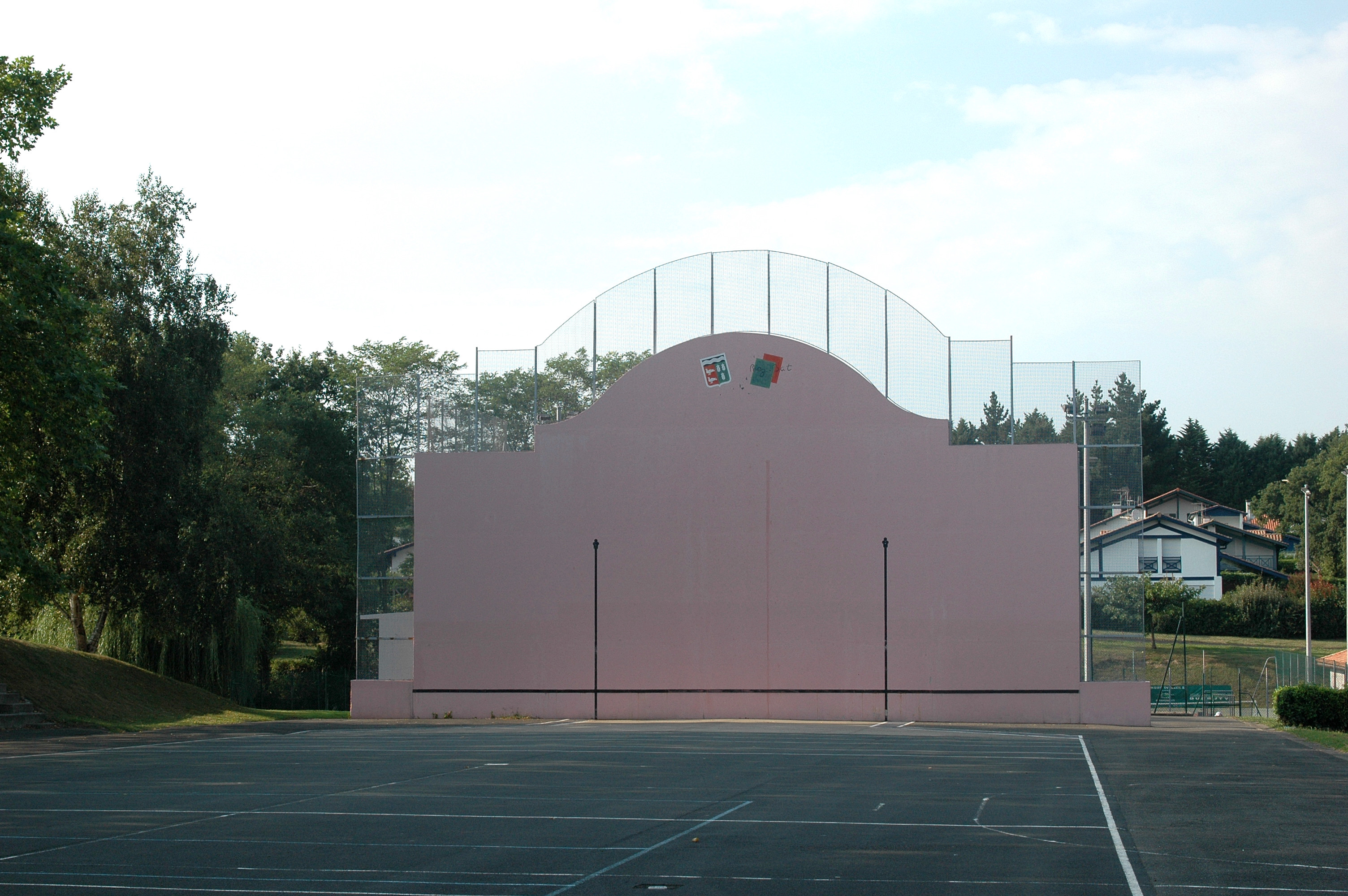 Bassussarry, le fronton place libre. Photo prise le 07/08/06 par Harrieta171